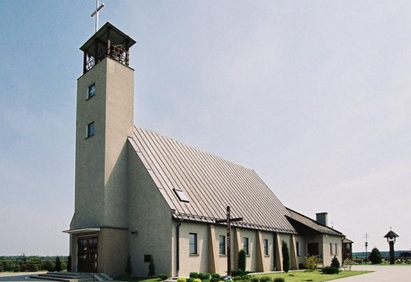 Kościół św. Idziego w Gronowicach